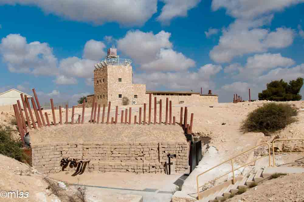 the big cave 2012